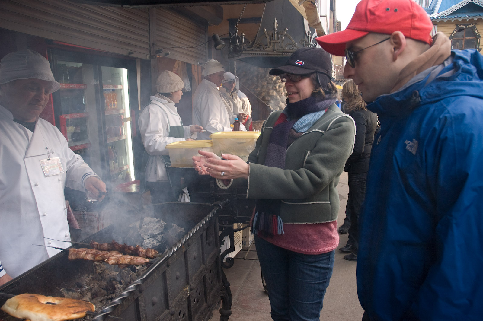 Cherkizovsky Market, Moscow